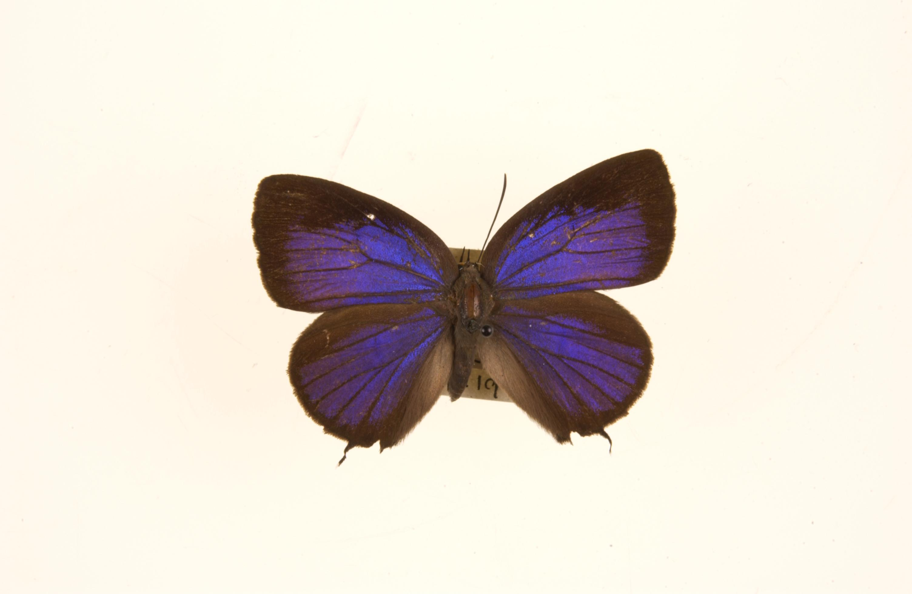 Arhopala agrata male